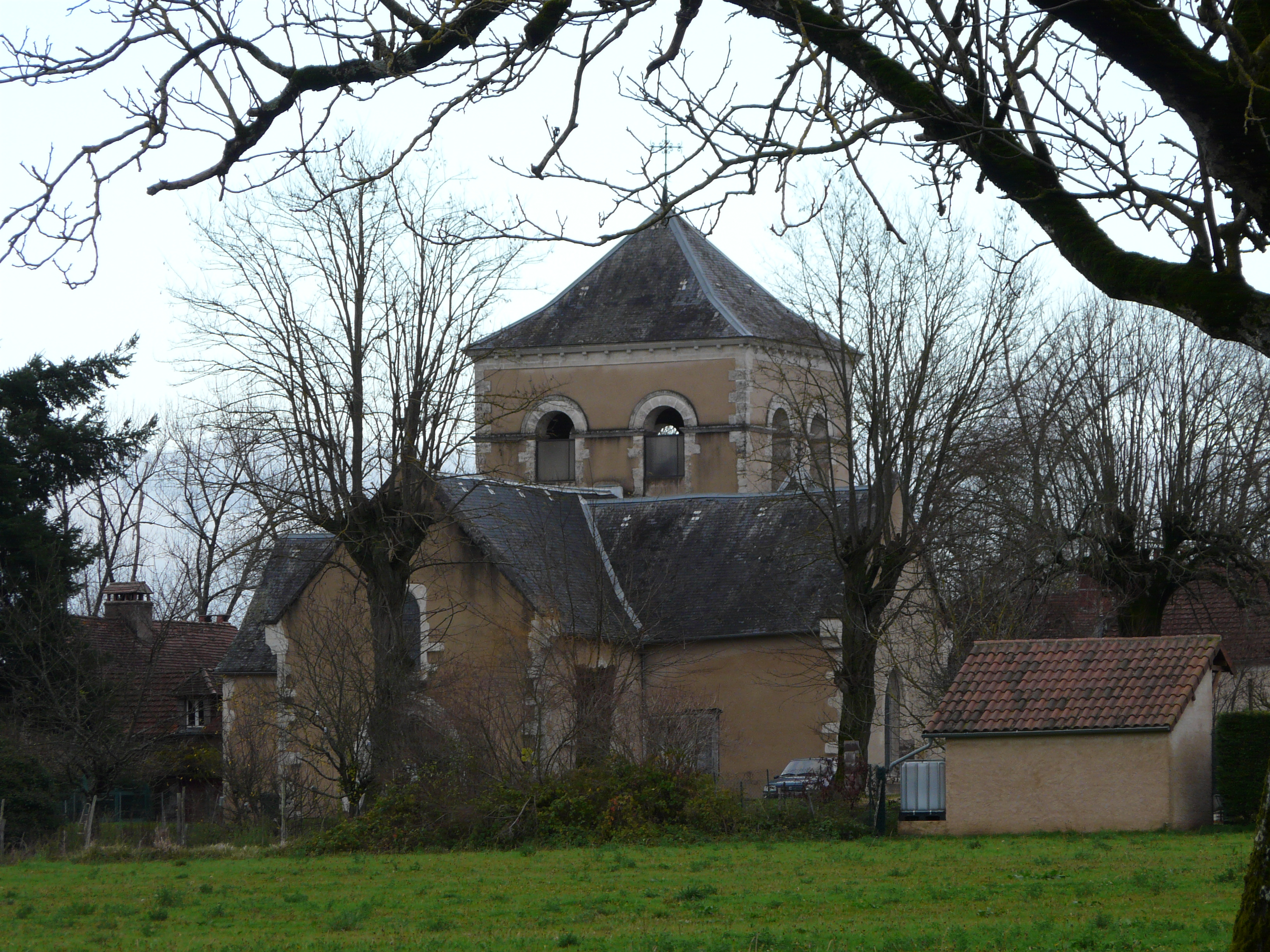 L'église Saint-Martin vue depuis le nord-ouest, La Boissière-d'Ans, Dordogne, France